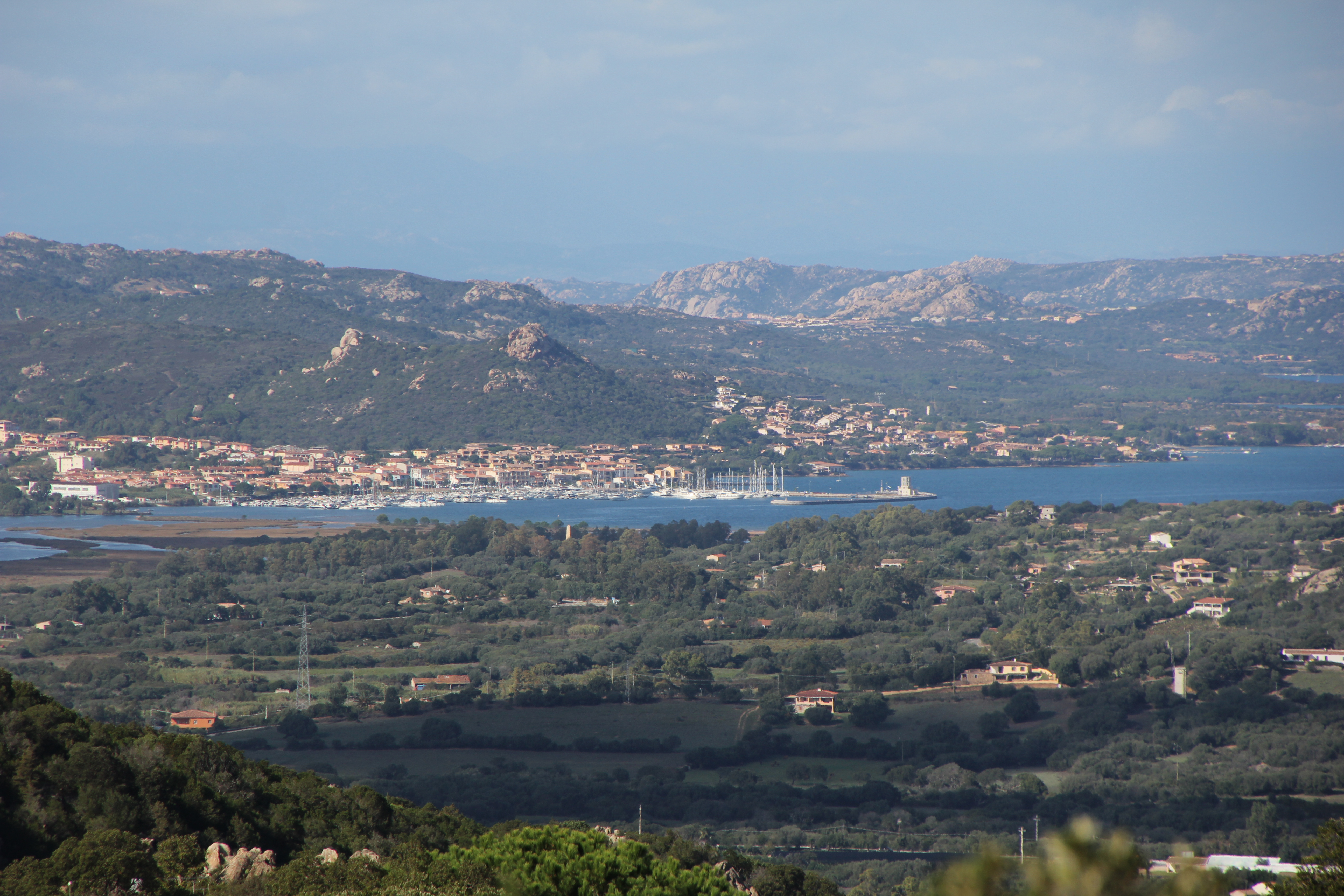 Arzachena, frazione Cannigione, panorama